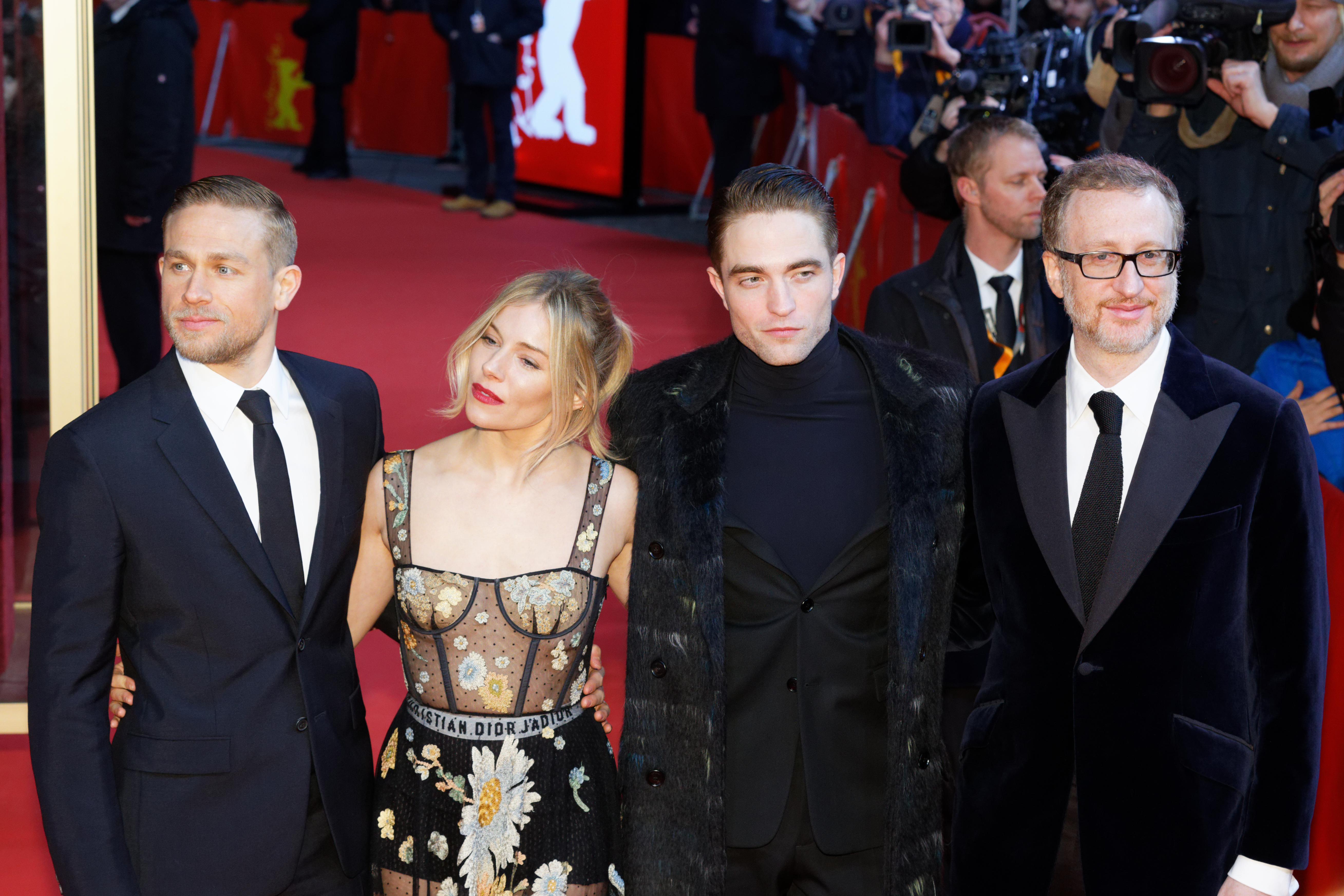 Cast & Crew bei der Premiere von Die versunkene Stadt Z im Zoo Palast bei der Berlinale 2017: v.l.n.r. Charlie Hunnam, Sienna Miller, Robert Pattinson, James Gray